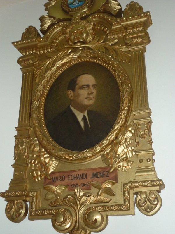 Mario Echandi, presidente de Costa Rica en 1958 - 1962